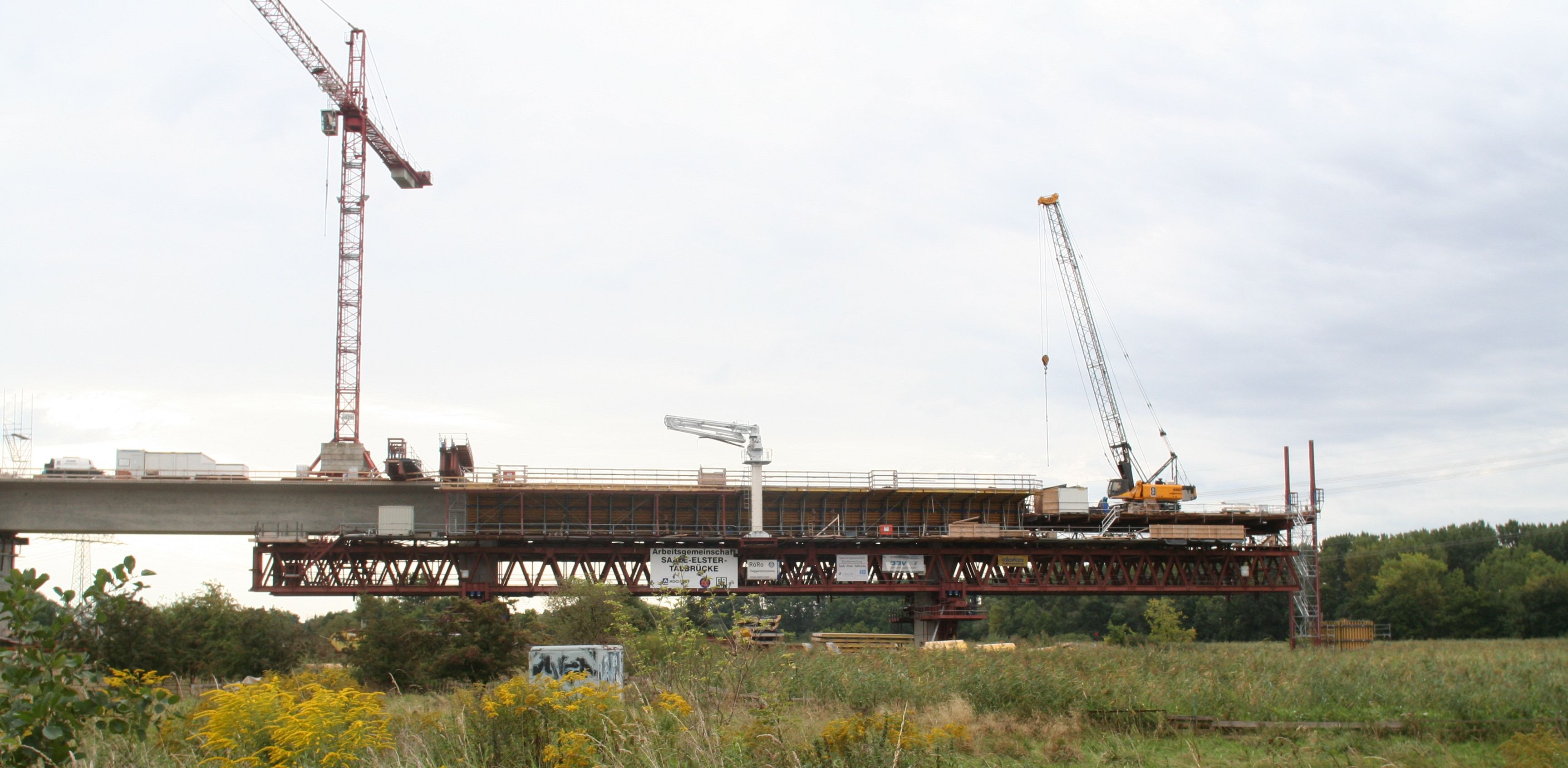 Vorschubrüstung der Saale-Elster-Talbrücke bei Halle